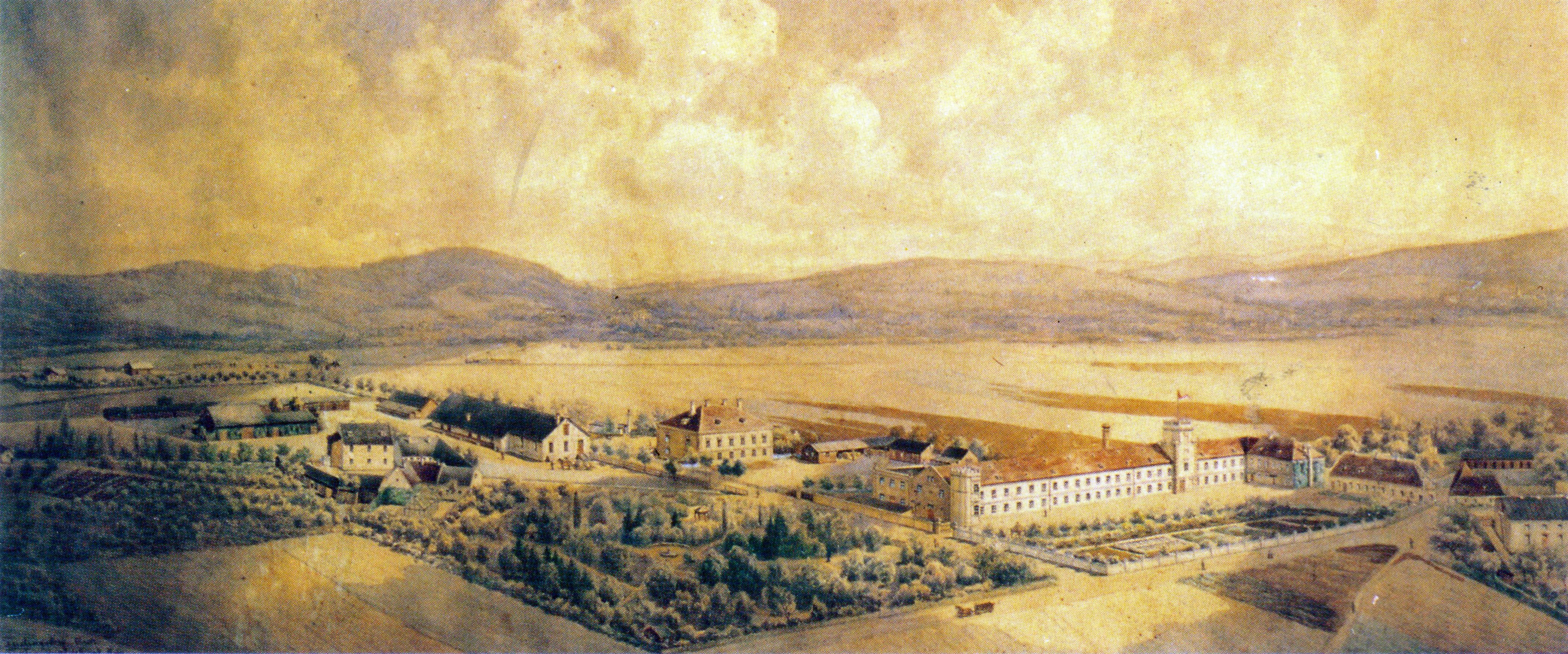 Die ehemalige Hübscher-Fabrik in Radlberg